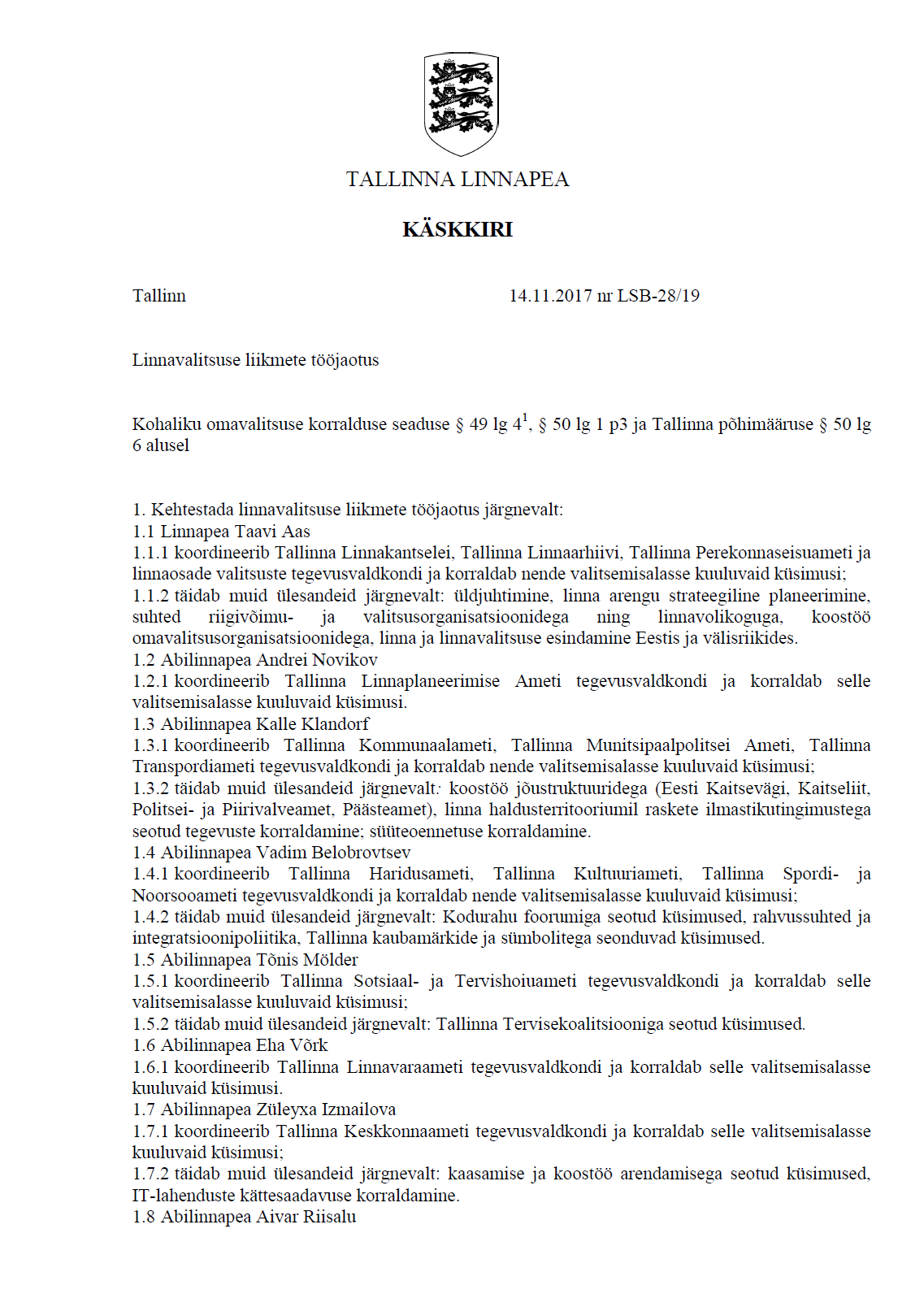 Tallinna linnapea Taavi Aasa (Aas) 14.11.2017 käskkiri nr LSB-28/19 "Linnavalitsuse liikmete tööjaotus" lehekülg 1/2.